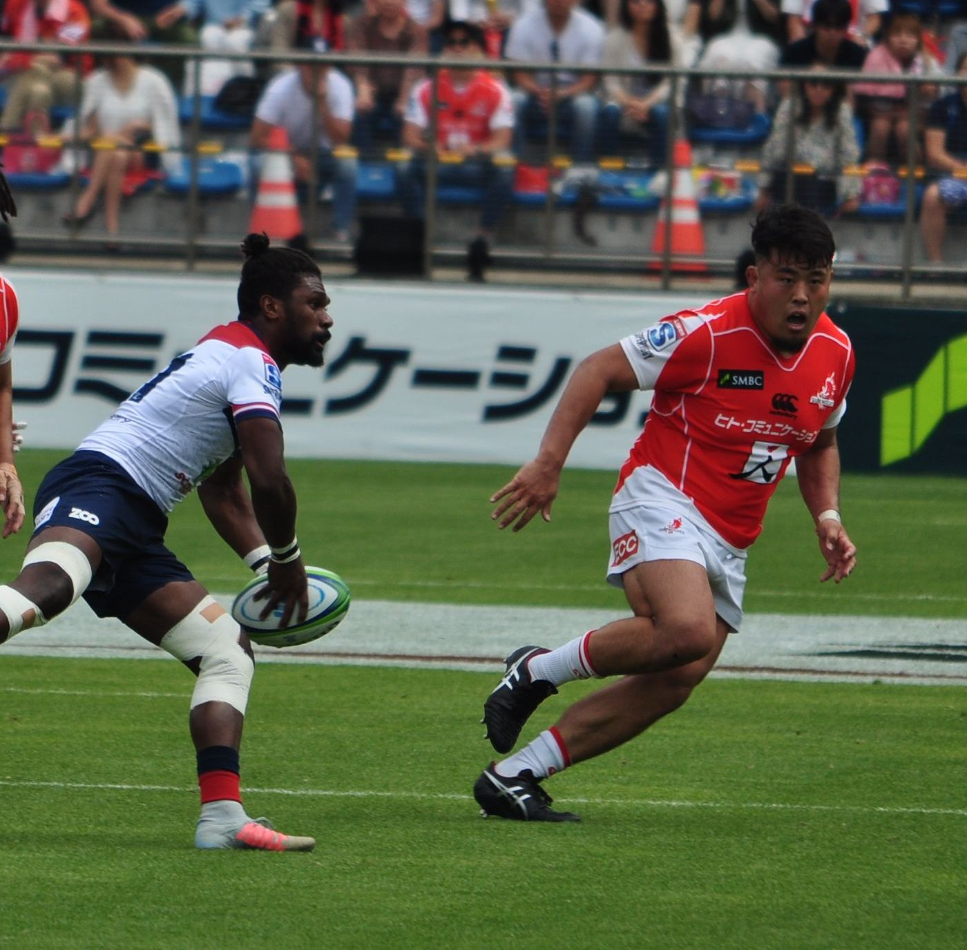 サンウルブズ vs レッズ戦